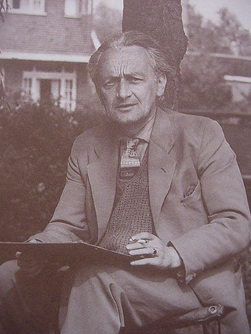 Piet te Lintum, (Aalten, 13 januari 1909 – Winterswijk, 1 mei 1985), Dutch painter